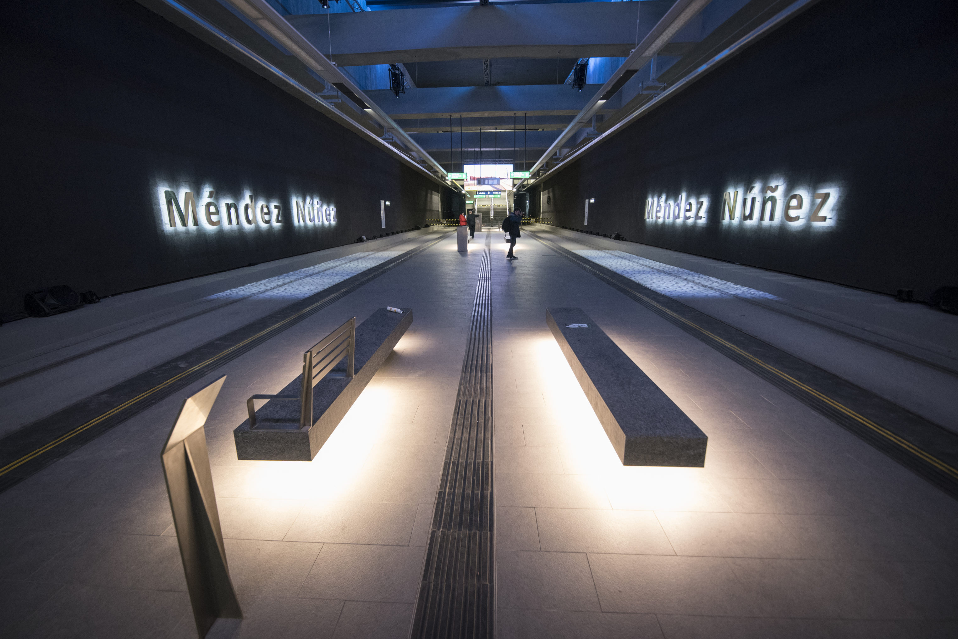 Estación de Méndez Núñez